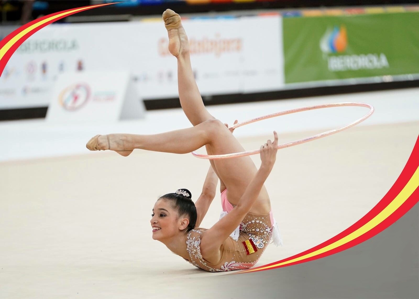 Sara Llana en el Campeonato de España Individual en Guadalajara en junio de 2018.